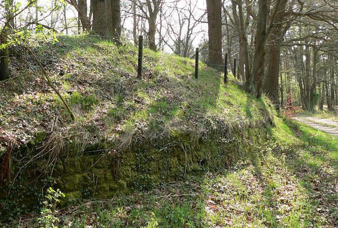 Wallkrone des Ringwall von Burg Circular rampart at Burg, near Celle, Lower Saxony, Germany.